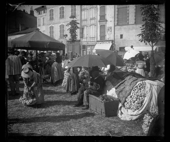 Place du Salin. 24 août 1899. Vue de détails d'étals et de marchands de la Foire à l'ail Au premier plan à droite bulbes d'ail, marchands assis protégés par un parapluie, caisse de bois, au second plan marchande vue de face penchée sur des bulbes d'ails, foule sous parasol, en arrière plan façades du côté ouest de la place.